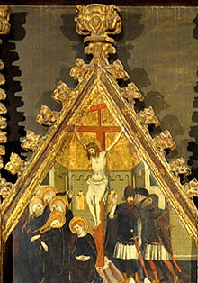 Retaule de Sant Marc i Sant Anià, obra d'Arnau Bassa (1346). Actualment a la Seu de Manresa. Taula de la Crucifixió a sobre de la taula central.